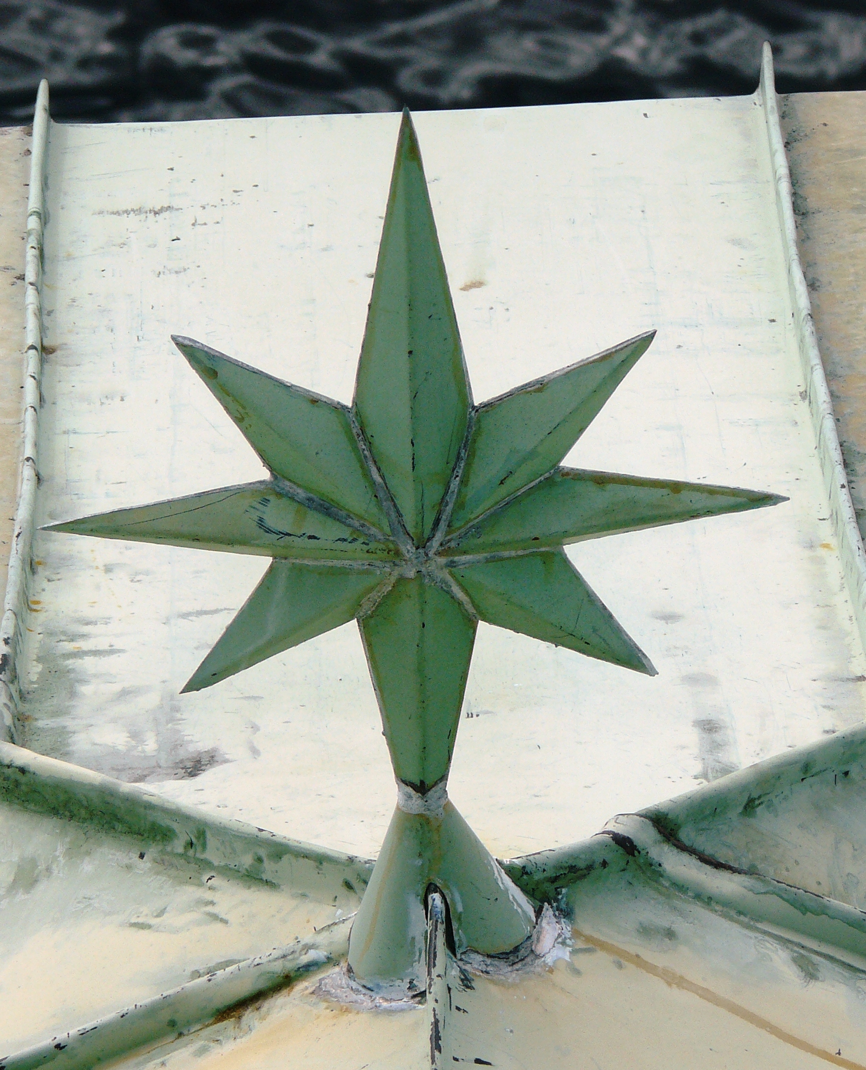 Kongen, building in Frogner, Oslo - detail